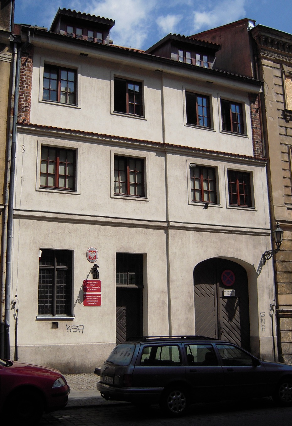 Toruń, ul. Łazienna 8 - kamienica, oficyna (XVIII w.), obecnie Wojewódzki Urząd ochrony Zabytków w Toruniu (zabytek nr A/81/322)